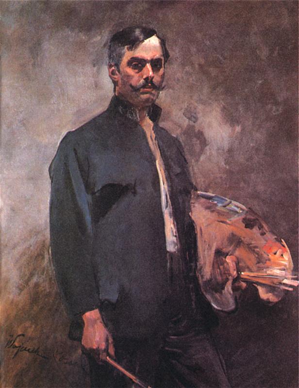 Autoportret Wojciecha Kossaka z paletą.